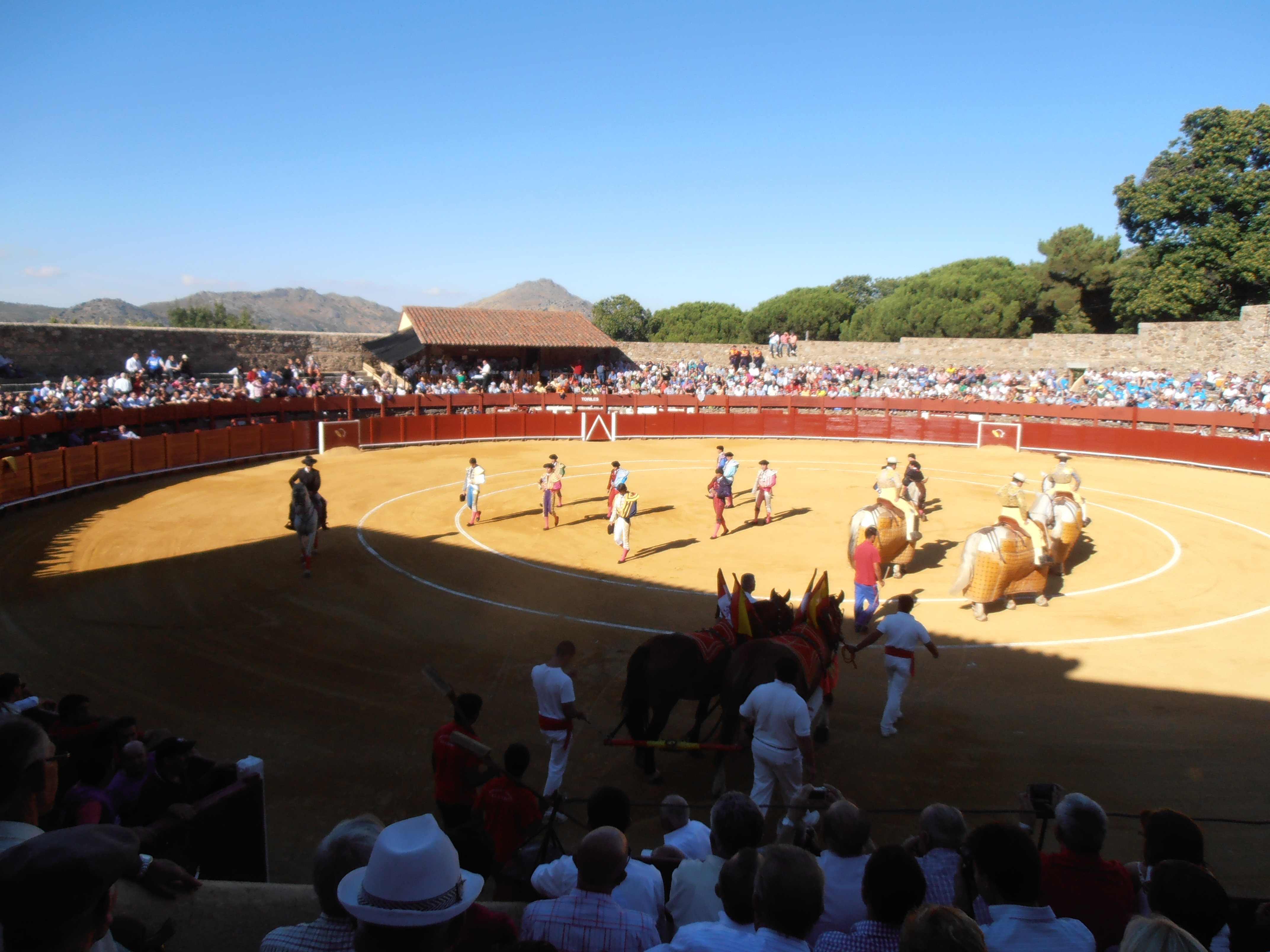 Paseillo de cuadrillas en la plaza en la plaza de toros de Béjar